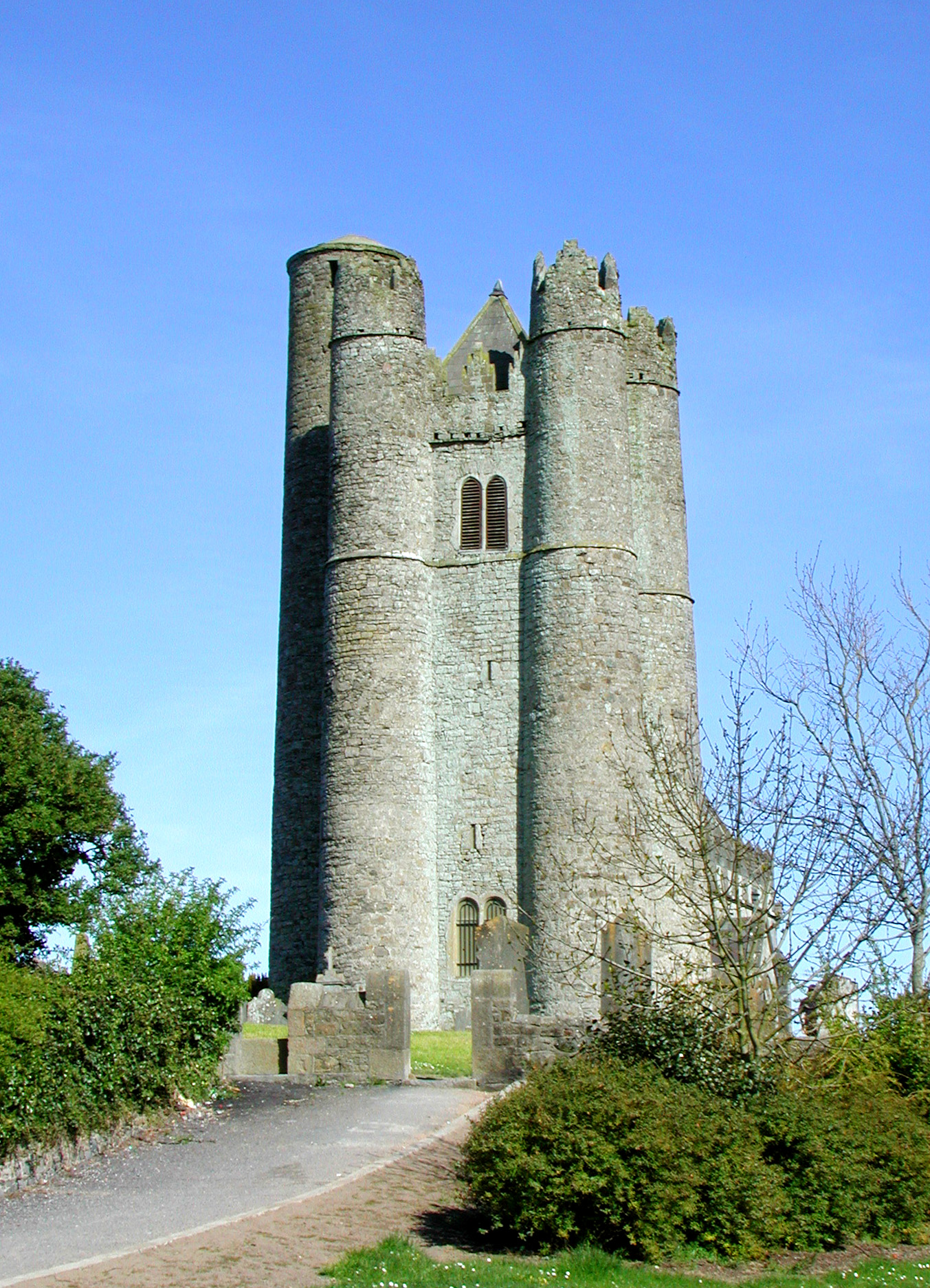 Seipeal Lusca